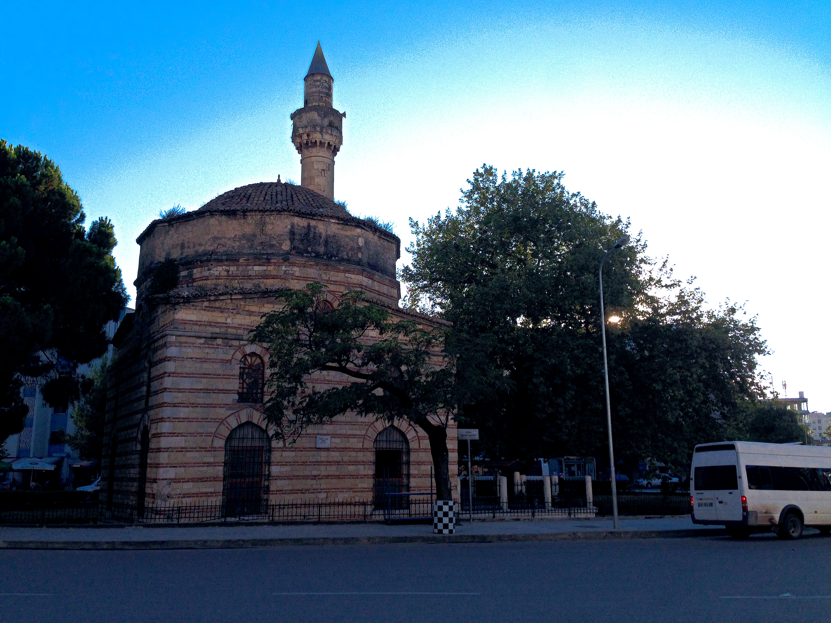 Xhamia E Muradies